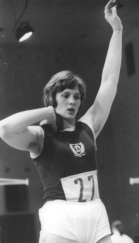 Marianne Adam ADN-ZB Wendorf-23.02.1975 Senftenberg:20,42 m erzielte Marianne Adam (SC Dynamo Berlin) im Kugelstoßen am 23.02. auf den Leichtathletik-Hallenmeisterschaften der DDR. Die Vize-Europameisterin bewies mit der neuen DDR-Hallenbestleistung ihre gute Form in dieser Saison. Unser Foto stammt von einem früheren Wettkampf.